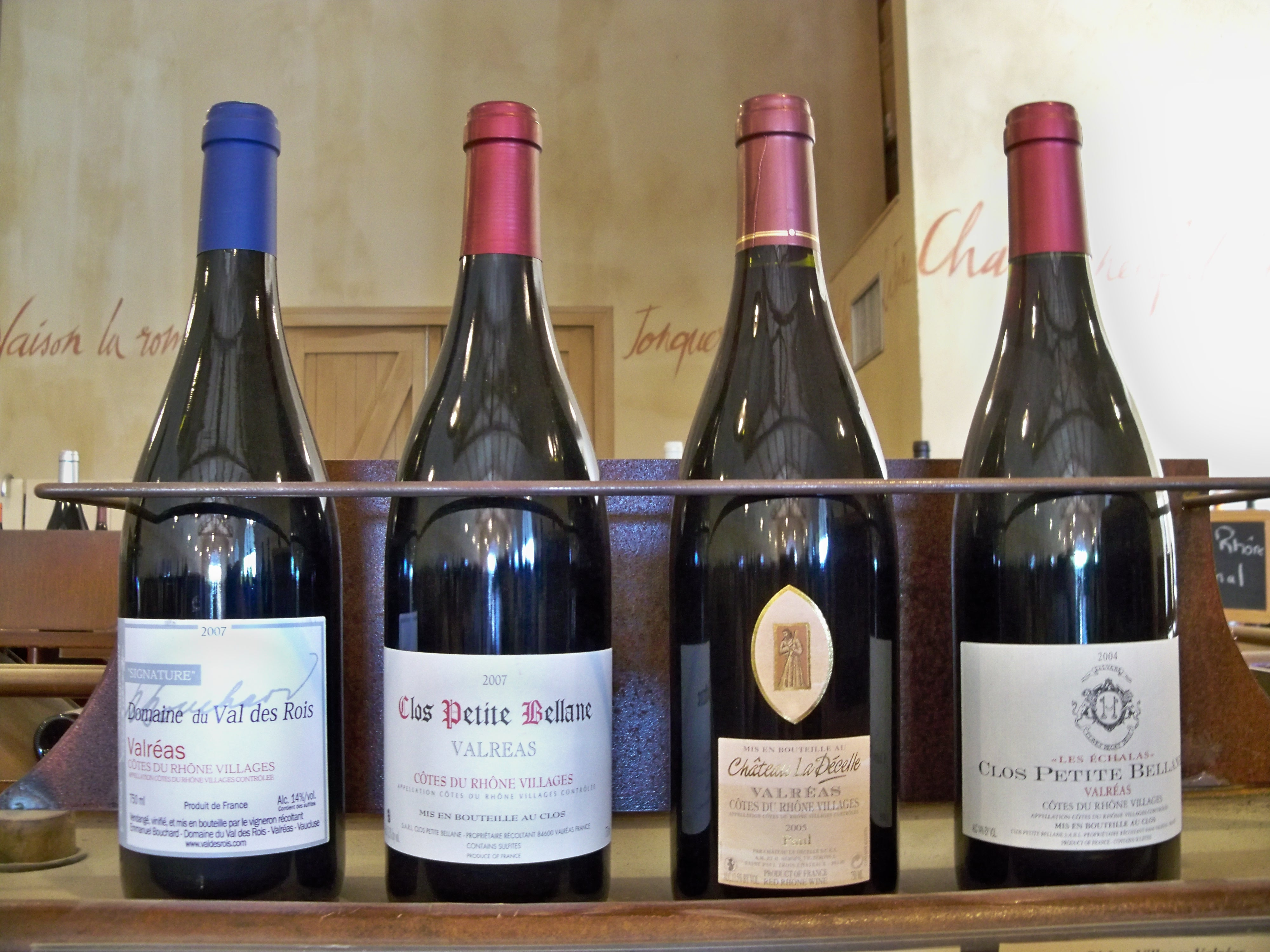 4 bouteilles de Côtes du Rhône Village